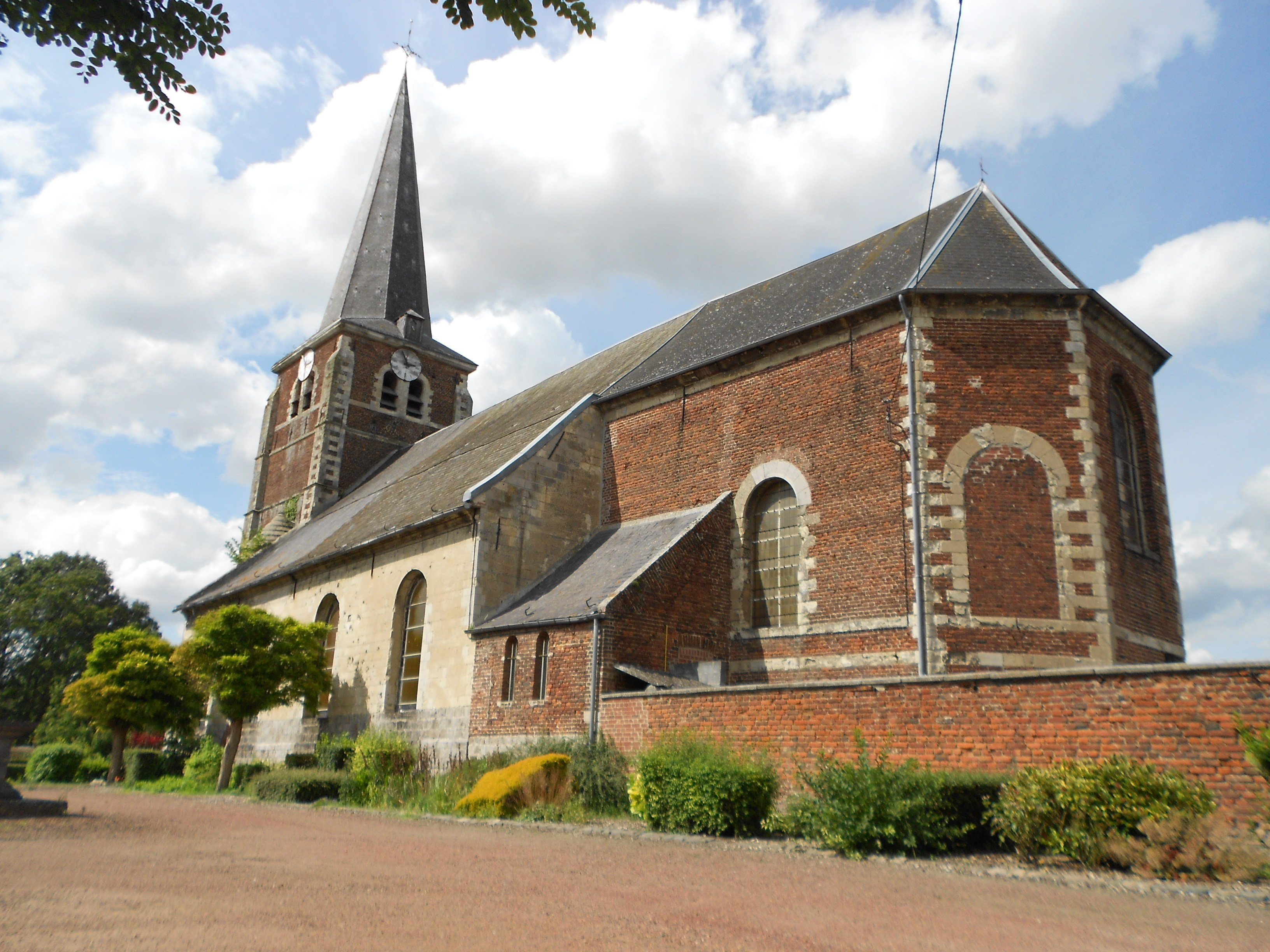 Eglise de Wasnes-au-Bac